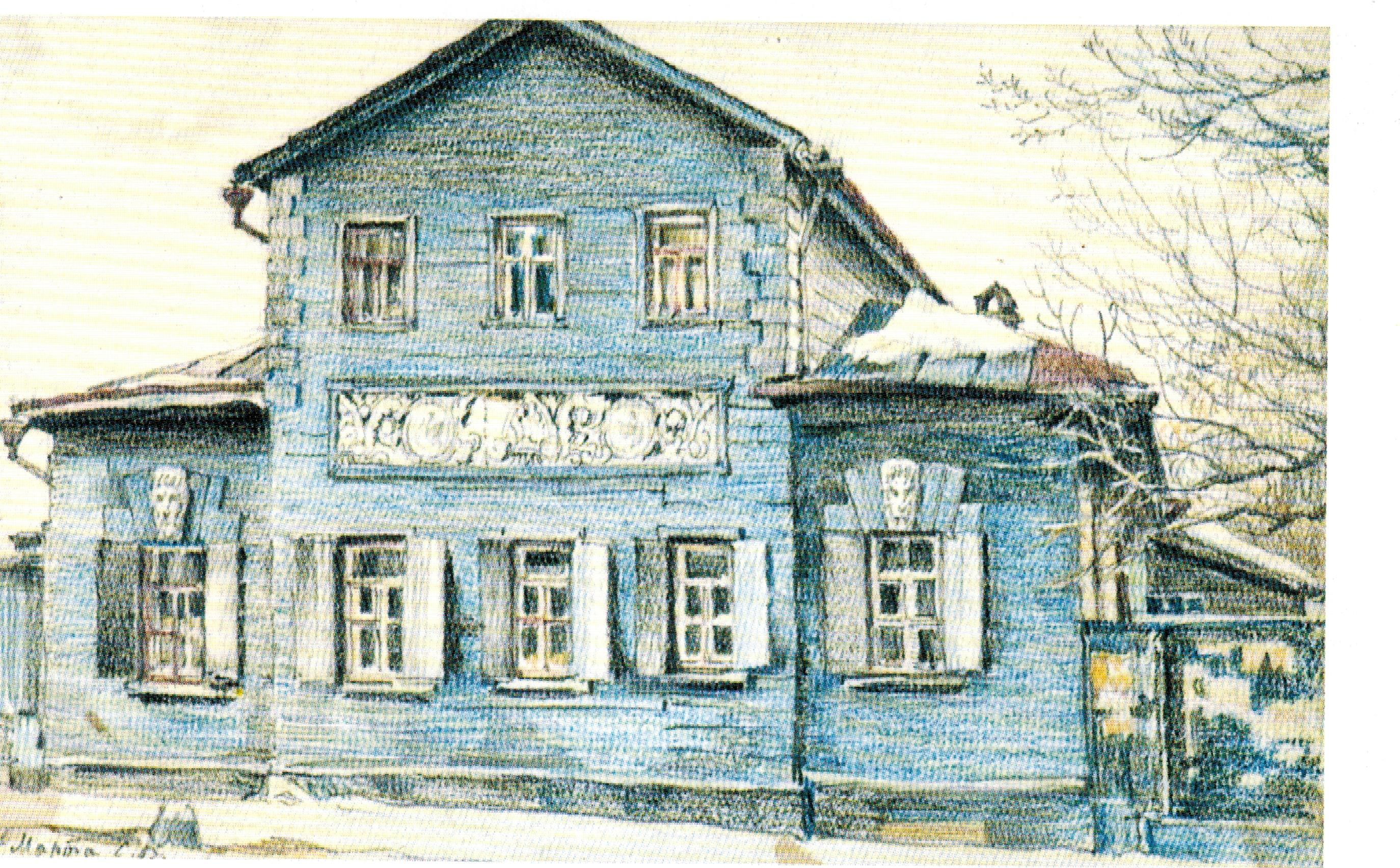 Домик в Малом Власьевском переулке. Бумага, графический и цветные карандаши. 12,5 x 19,5